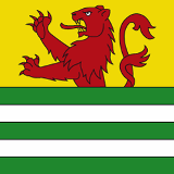 Flag of Balgach, Canton of St. Gallen - Flago de Balgach, Kantono de Sankt-Galo